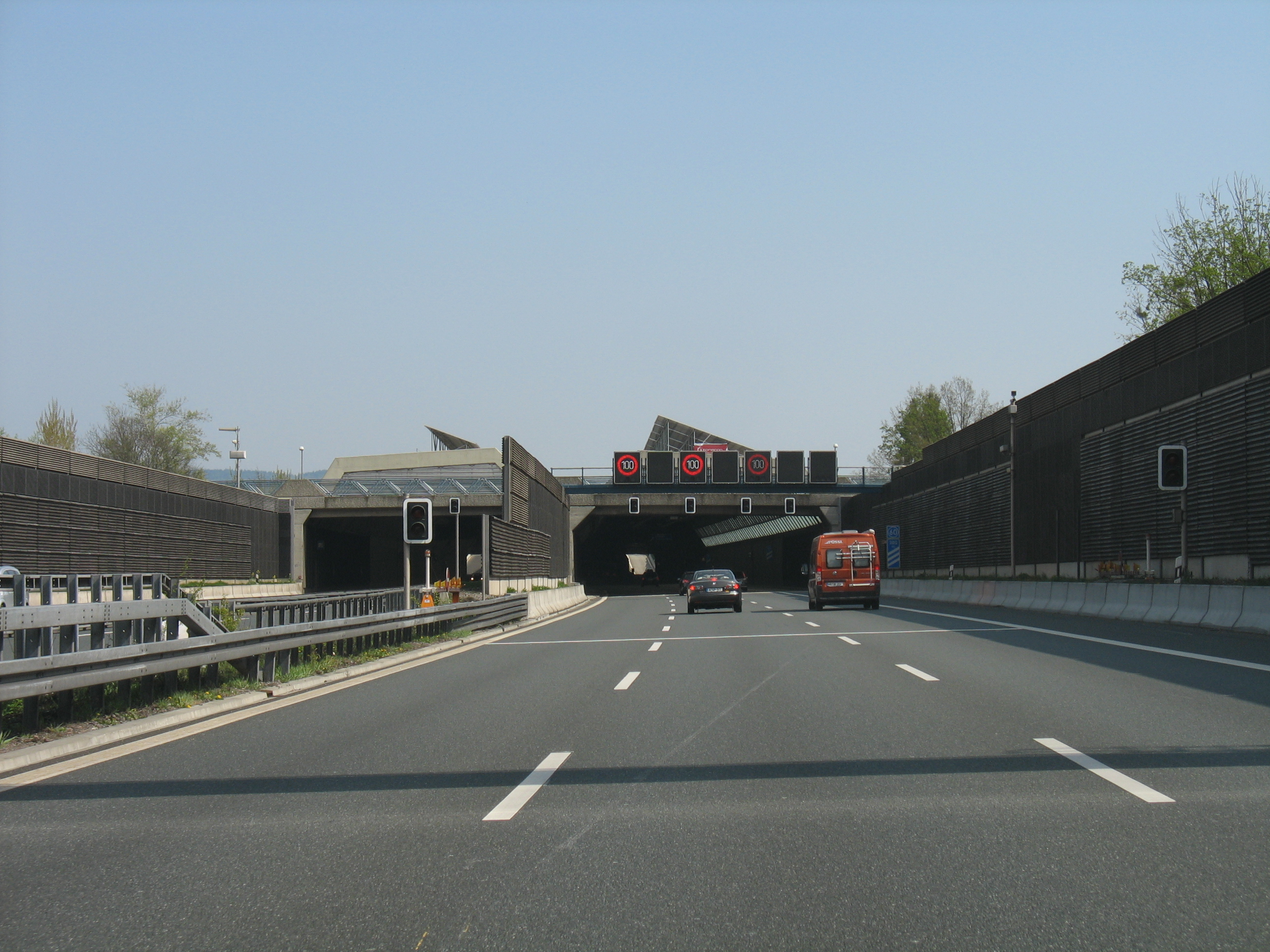 Einhausung der Autobahn A3 bei Hösbach.